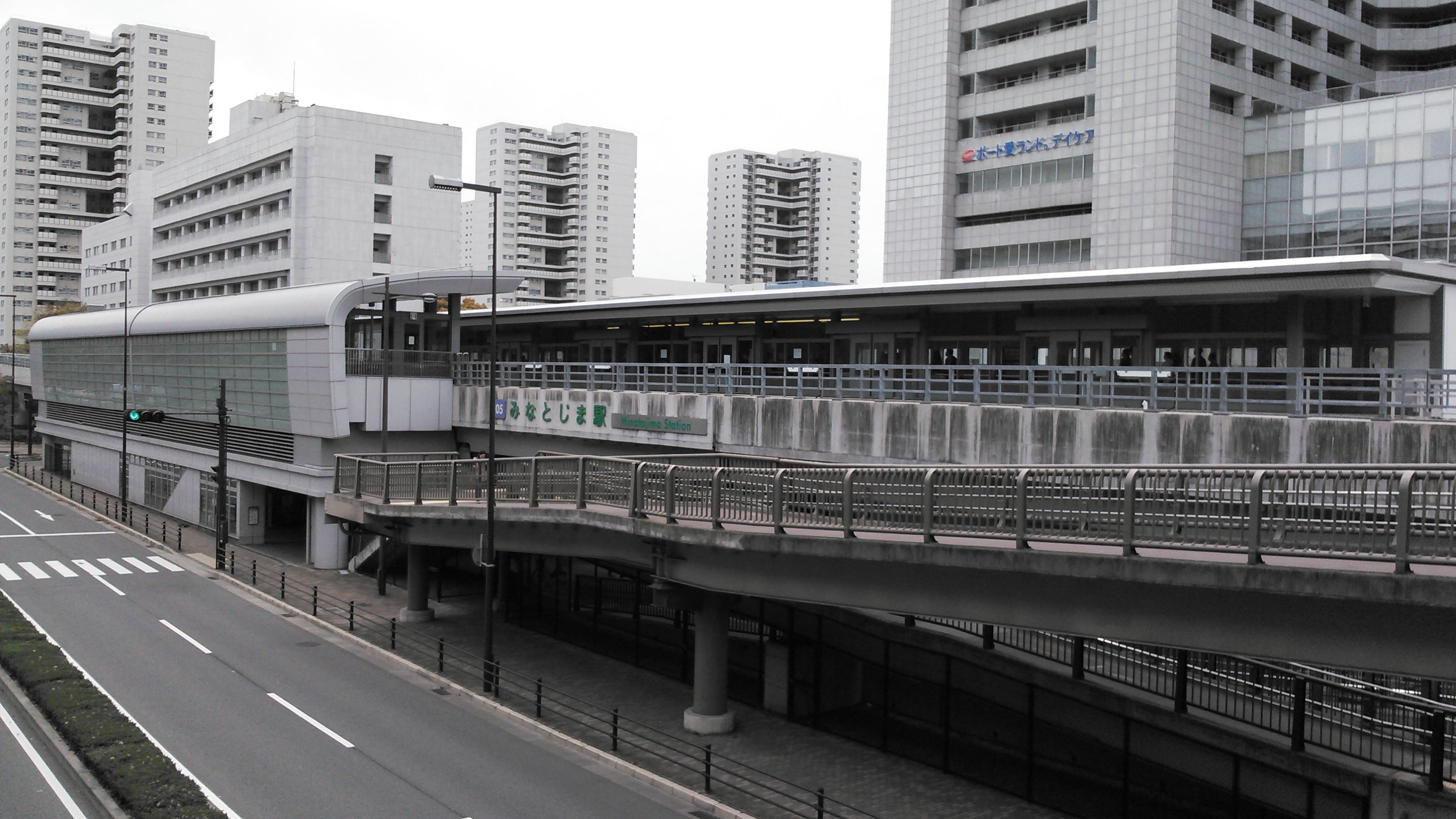 神戸新交通 ポートアイランド線 みなとじま駅